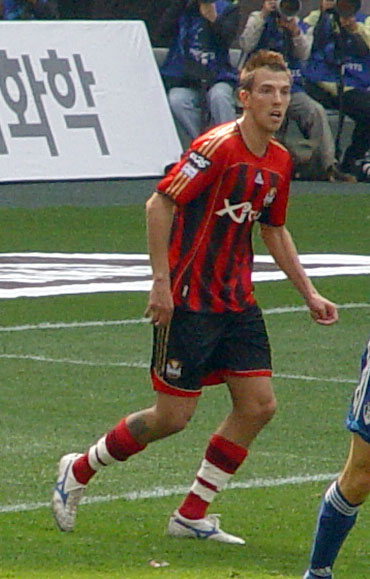 데얀. 서울월드컵경기장, 서울 대 수원 경기 중.